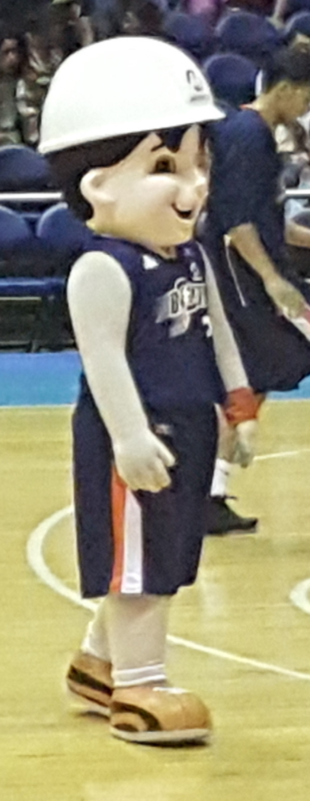 PBA - Meralco vs Alaska - Biboy Liwanag - 2016-0425